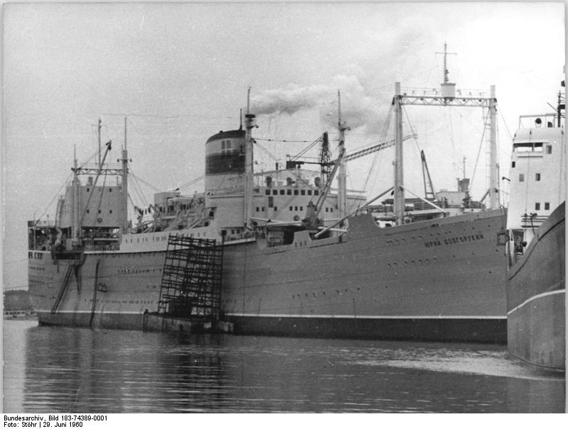 Zentralbild-Stöhr 29.6.1960 We-Noa. 24 000 to Wasserverdrängung....hat das Walfangmutterschiff "Jurij Dolgoruky", das auf der Warnow-Werft in Warnemünde für die Sowjetunion umgebaut wurde. Die hochmoderne Einrichtung des Schiffes gestattet Fangreisen von 4 - 7 Monaten in nördlichen Gewässern. Zur Ausrüstung gehört u.a. eine Startanlage für Hubschrauber. 60 Wale können in 24 Stunden auf dem Schiff verarbeitet werden. Nachdem die Probefahrt mit Erfolg beendet wurde, wird das Schiff in den nächsten Tagen an die Sowjetunion übergeben werden."